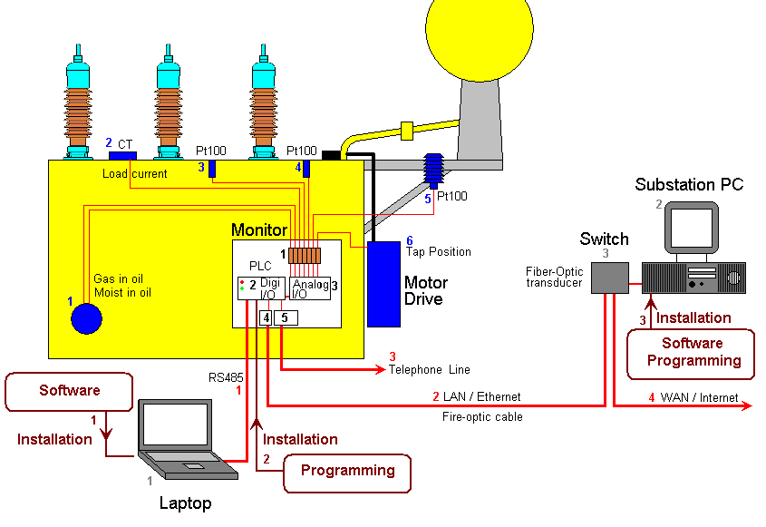 Schematische voorstelling van een monitoring systeem voor vermogentransformatoren